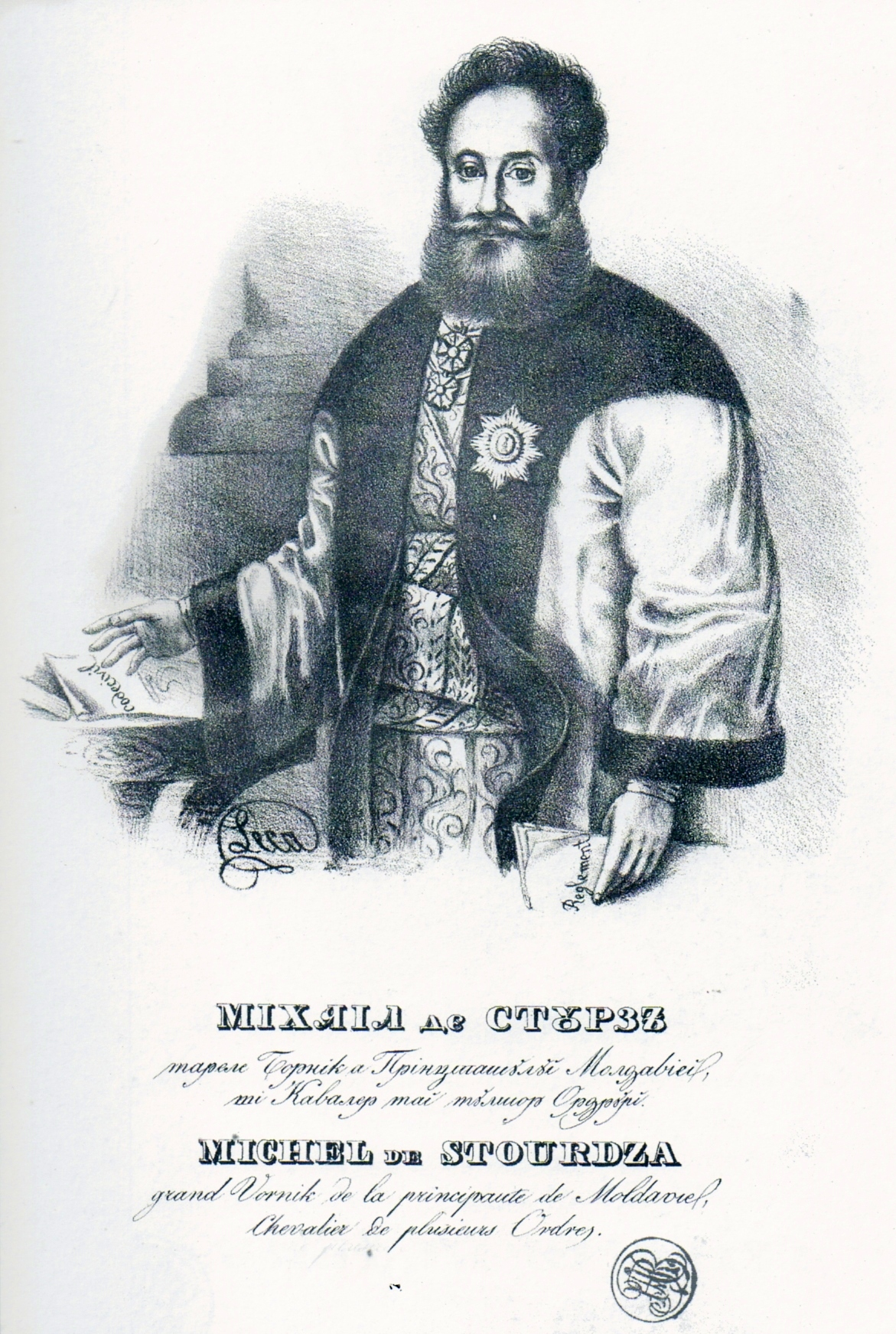 Portret Mihai Sturza, litografie, Biblioteca Academiei Române